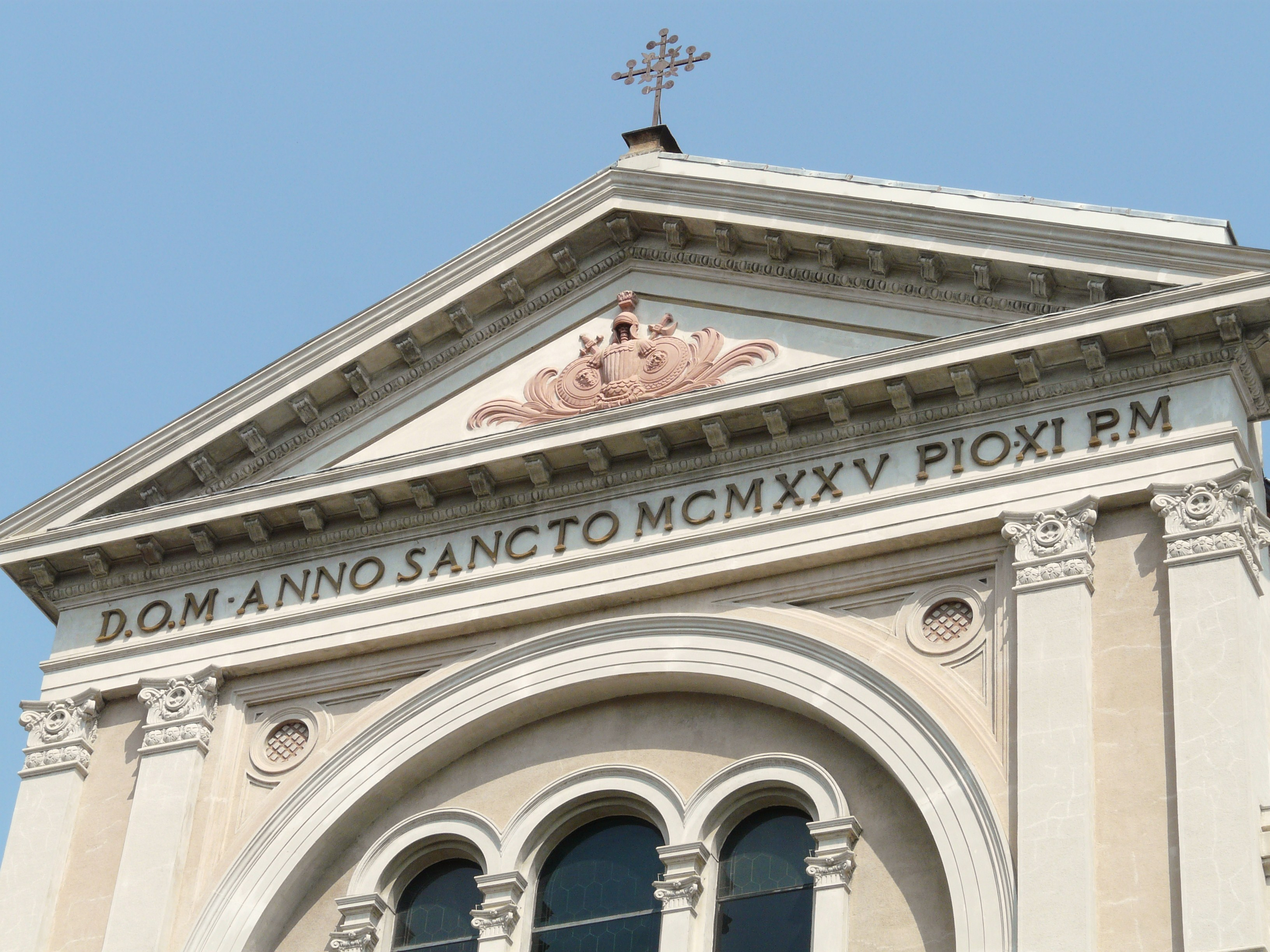 Chiesa di Sant'Antonino, Borgo Val di Taro, Emilia Romagna, Italia